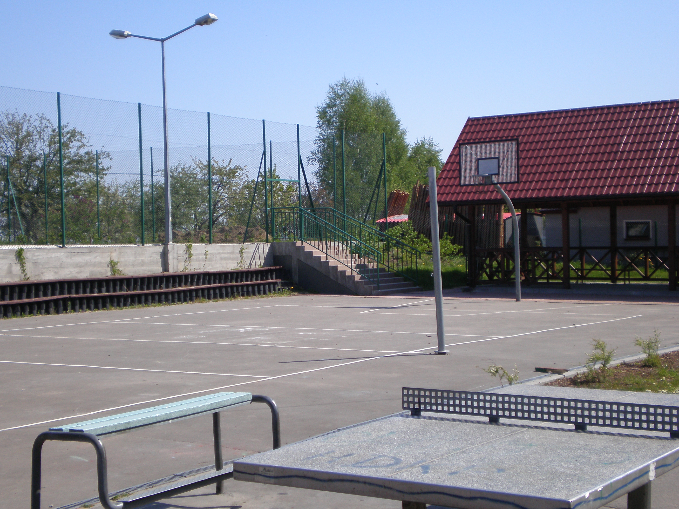 Boisko wielofunkcyjne dolne, Soboniowice